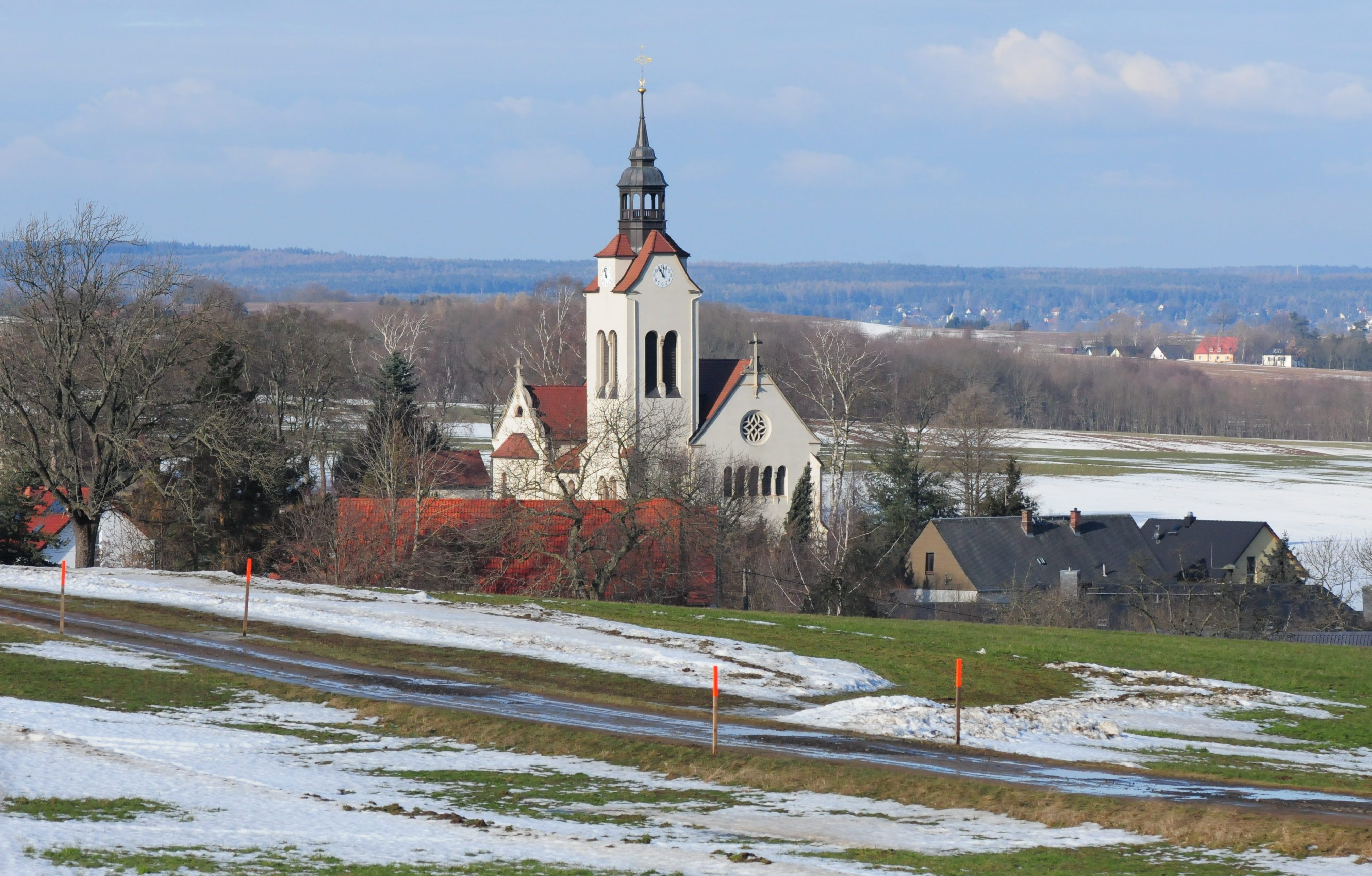 Stenn, Blick zur Kirche (Landkreis Zwickau, Freistaat Sachsen, Deutschland)